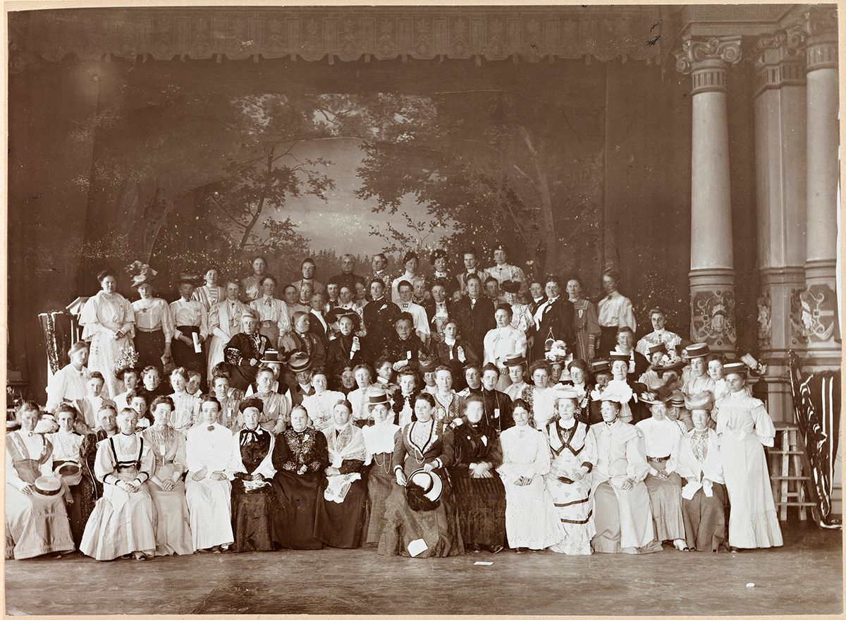 Landskvinnestemmerettighetsforeningen, stiftet 1898. Bildet er fra et møte på Lillehammer, ukjent dato.